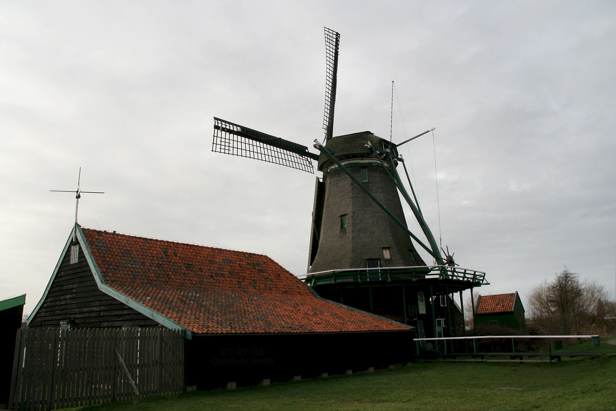 Zaanse Schans: Molen De Bonte Hen